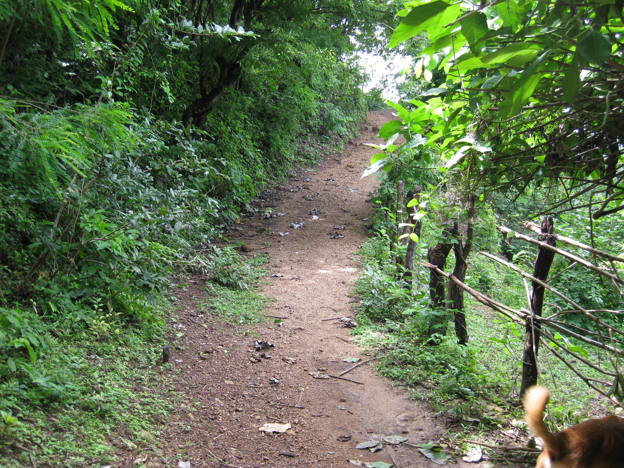 Caminos usados por los agricultores de la zonaq de san juan de cinco pinos.